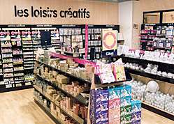 Rayon d'un magasin Cultura